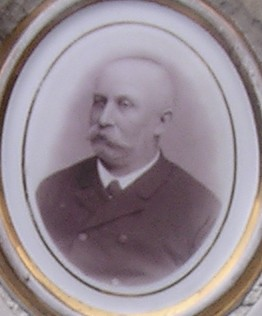 Náhrobek Valdemara Mazury (1838–1900) - detail fotografie